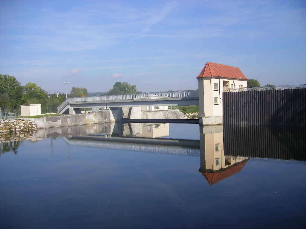 Hydroelectric power plant on the Danube between Oberdischingen and Erbach